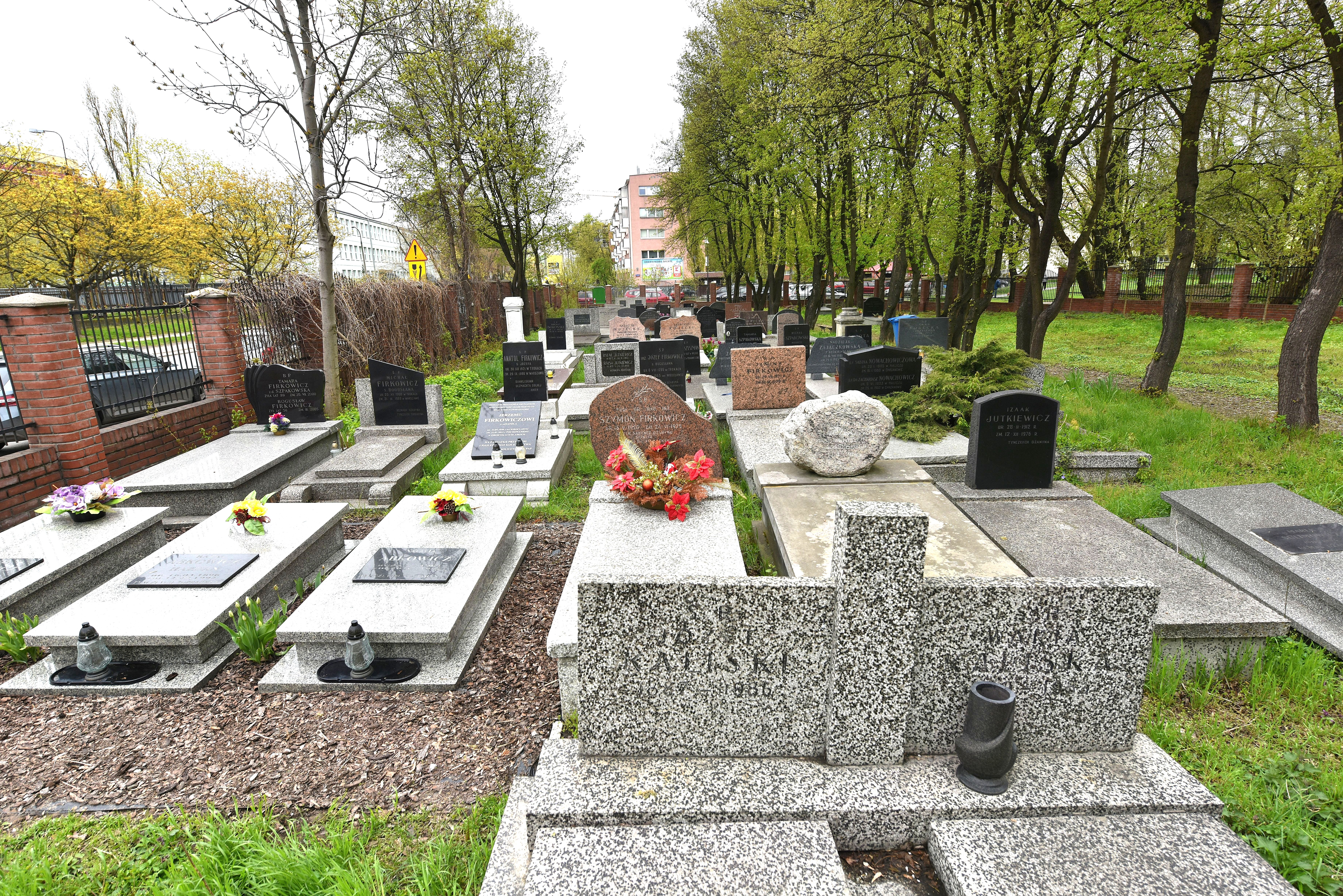 Cmentarz karaimski w Warszawie